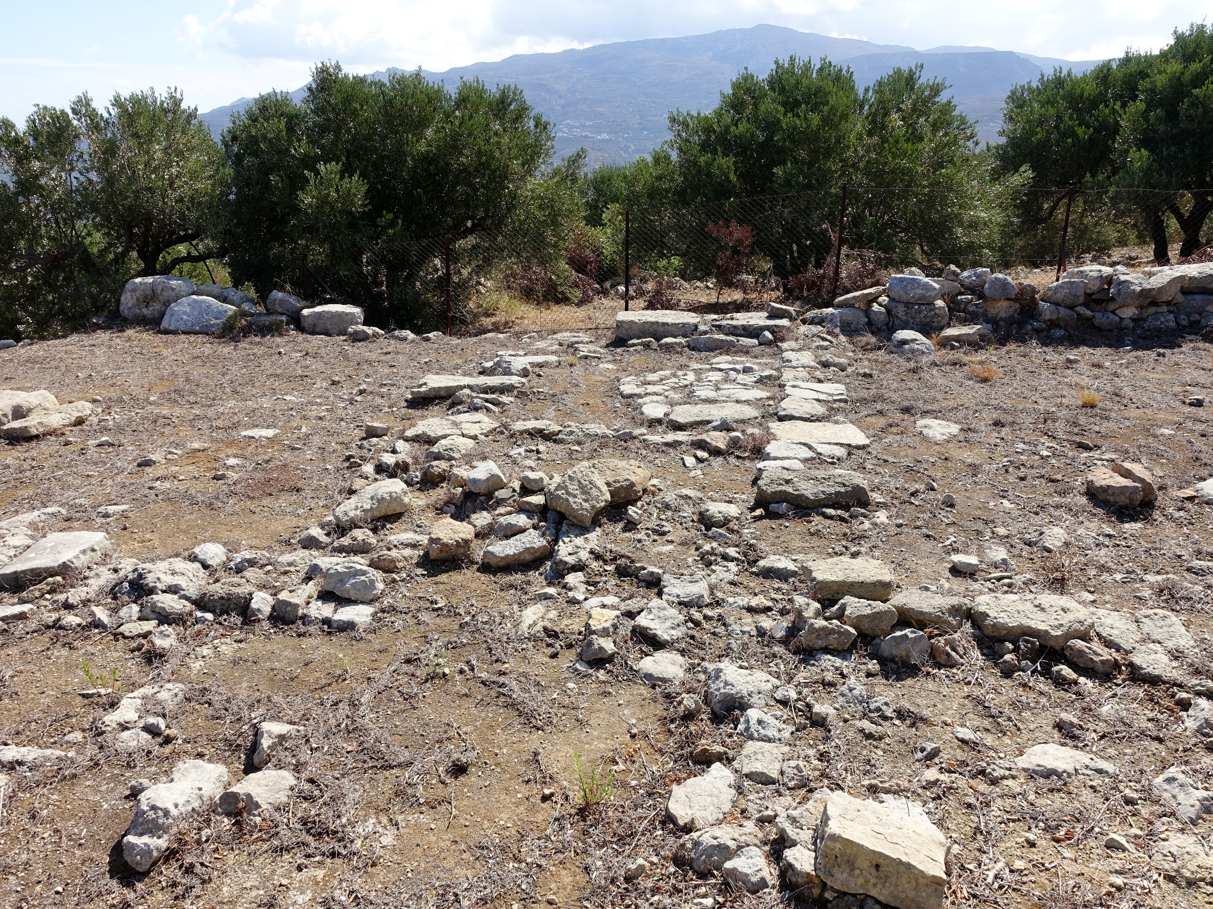 Minoische Villa von Achladia (Μινωική έπαυλη Αχλαδίων), Gemeinde Sitia, Kreta, Griechenland